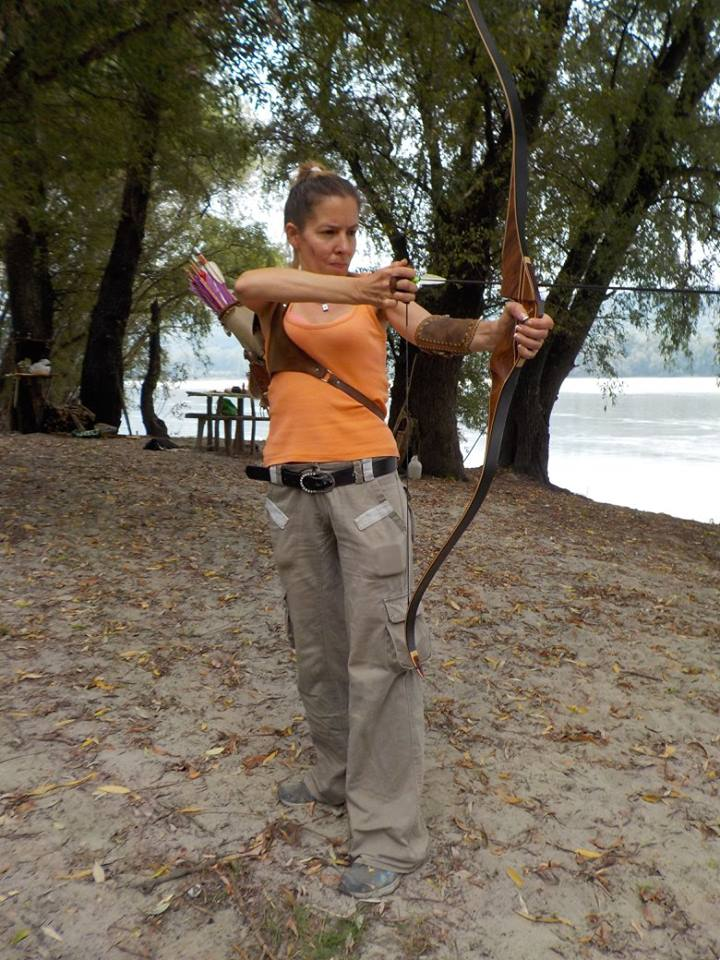 Eli Gilić (Beograd, 1972) srpski književni prevodilac